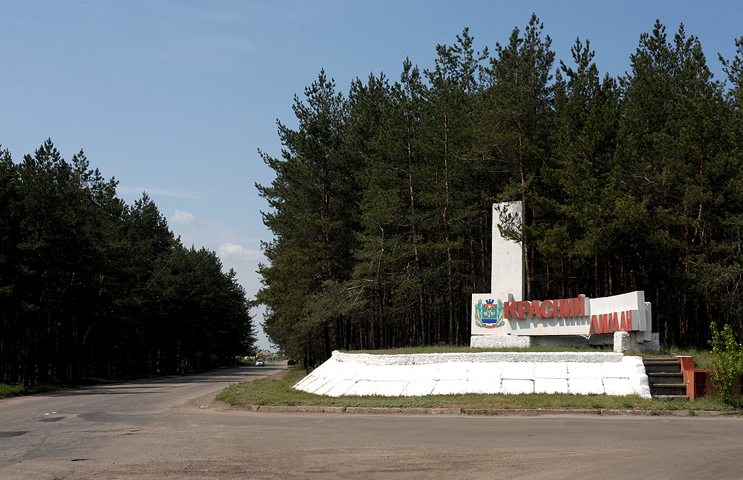 Красный Лиман